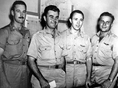 Tibbets, Lewis, Ferebee a van Kirk